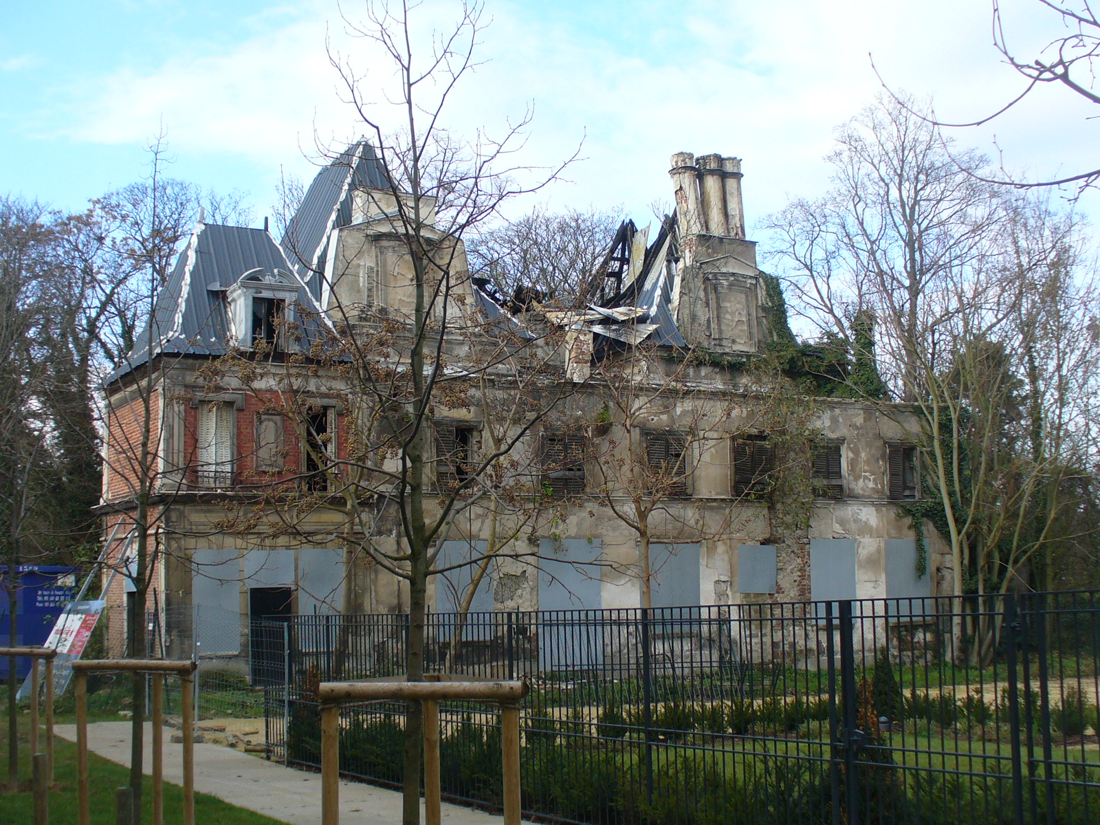 Château de Romainville (Seine-saint-Denis) (pavillon est)